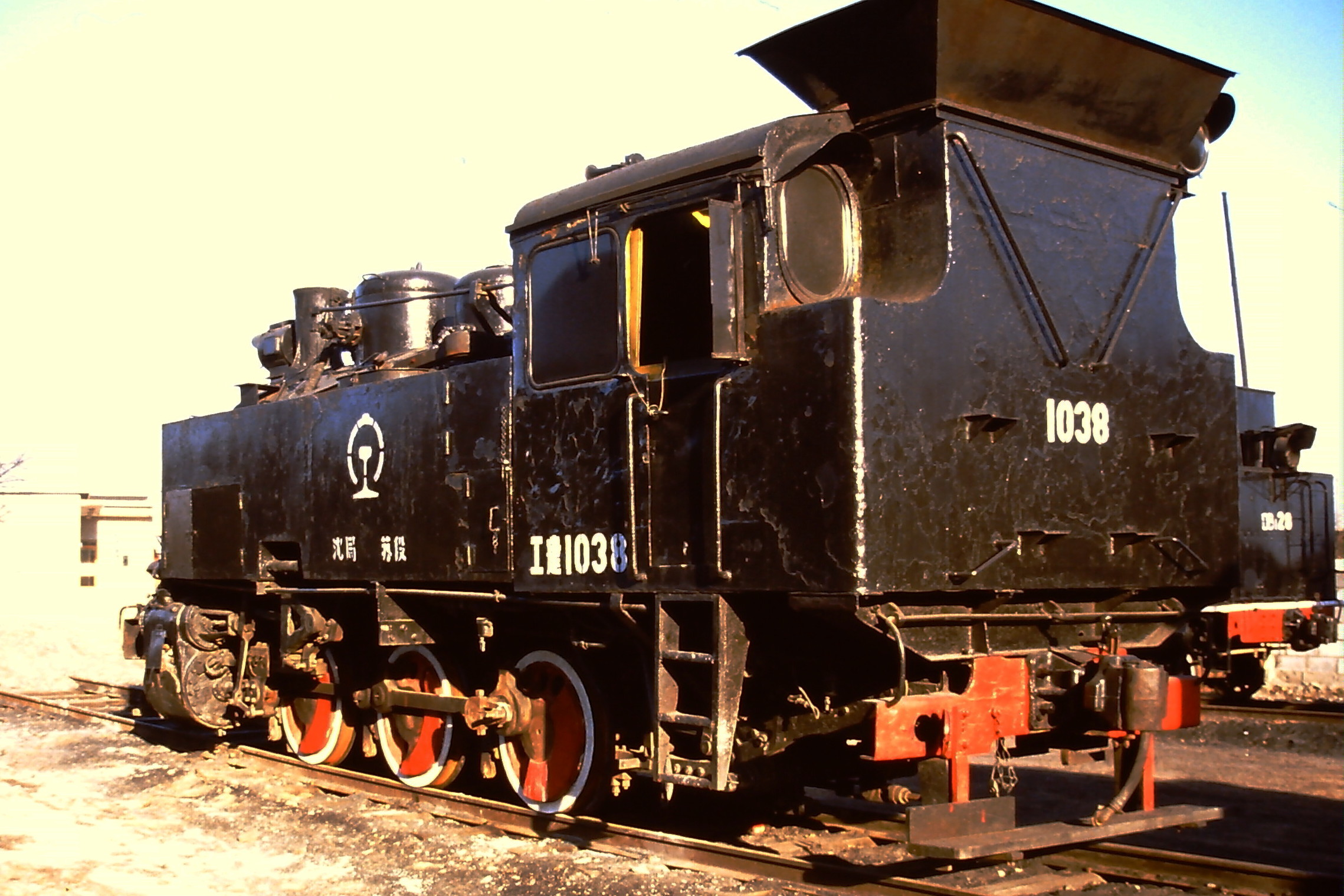 CNR GJ-1038 (Dampflokomotivmuseum Shenyang)